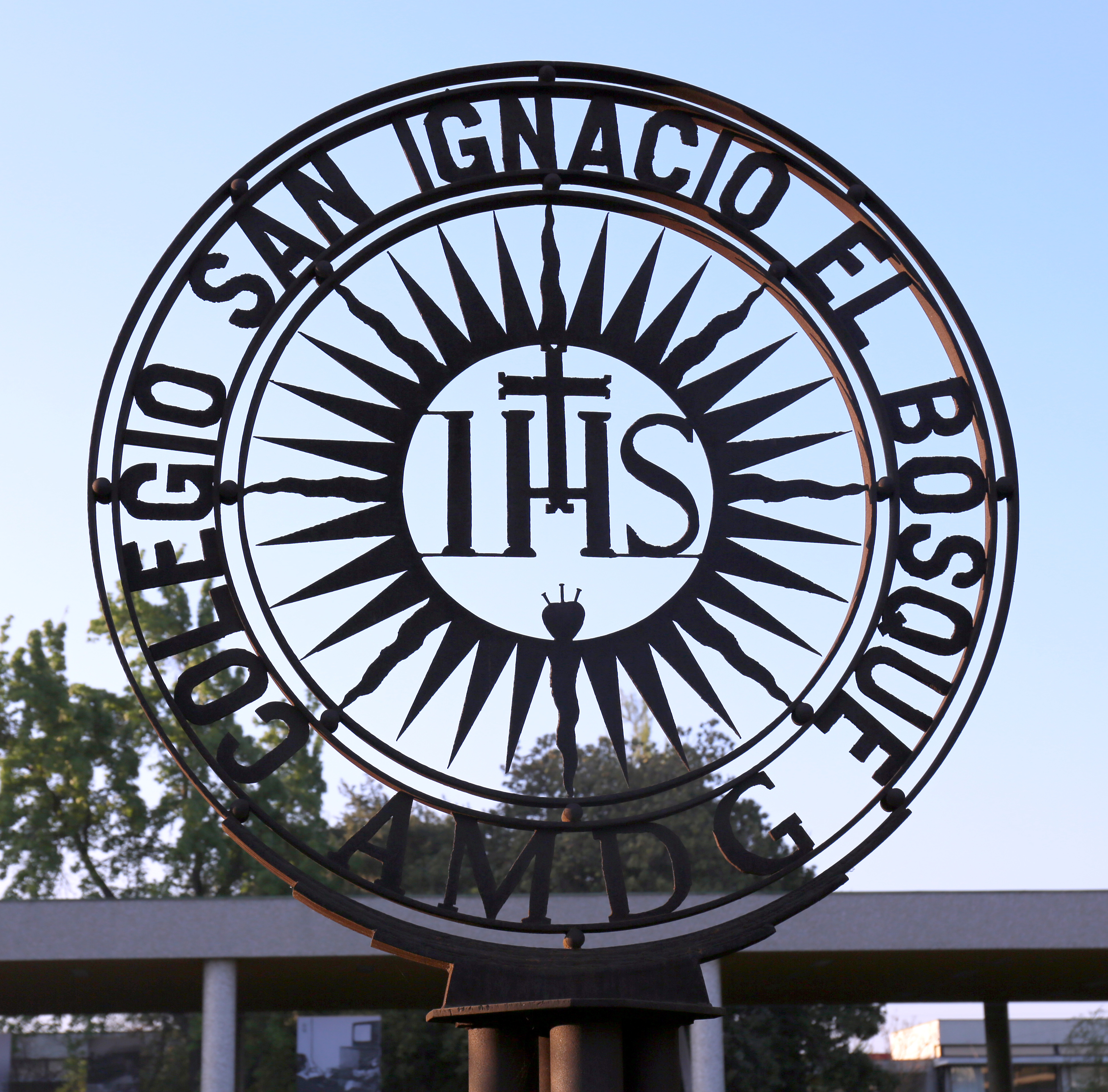 Imagen de la insignia del Colegio San Ignacio El Bosque